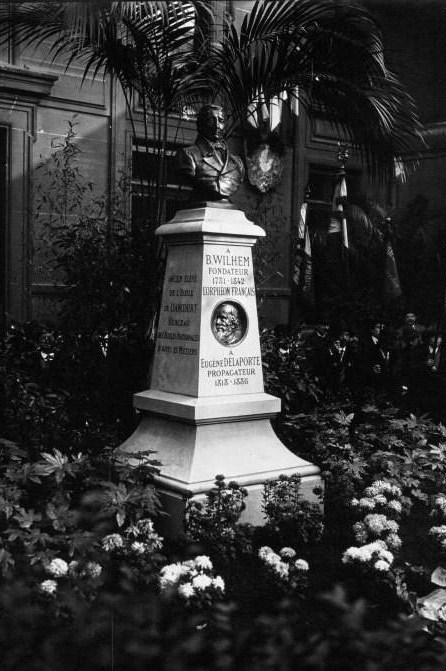 Le monument parisien à l'Orphéon, Wilhem et Delaporte.